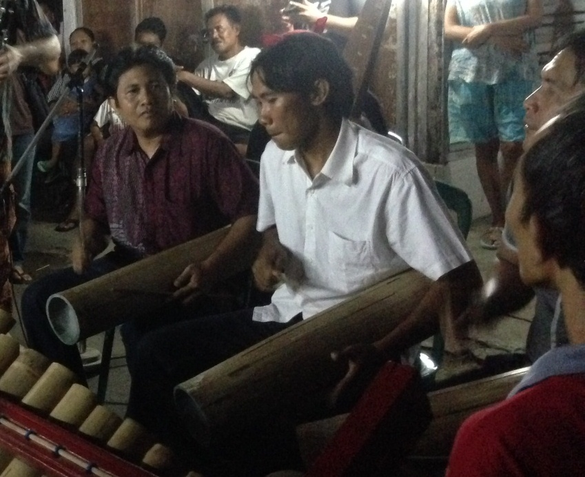 musik patrol Banyuwangi